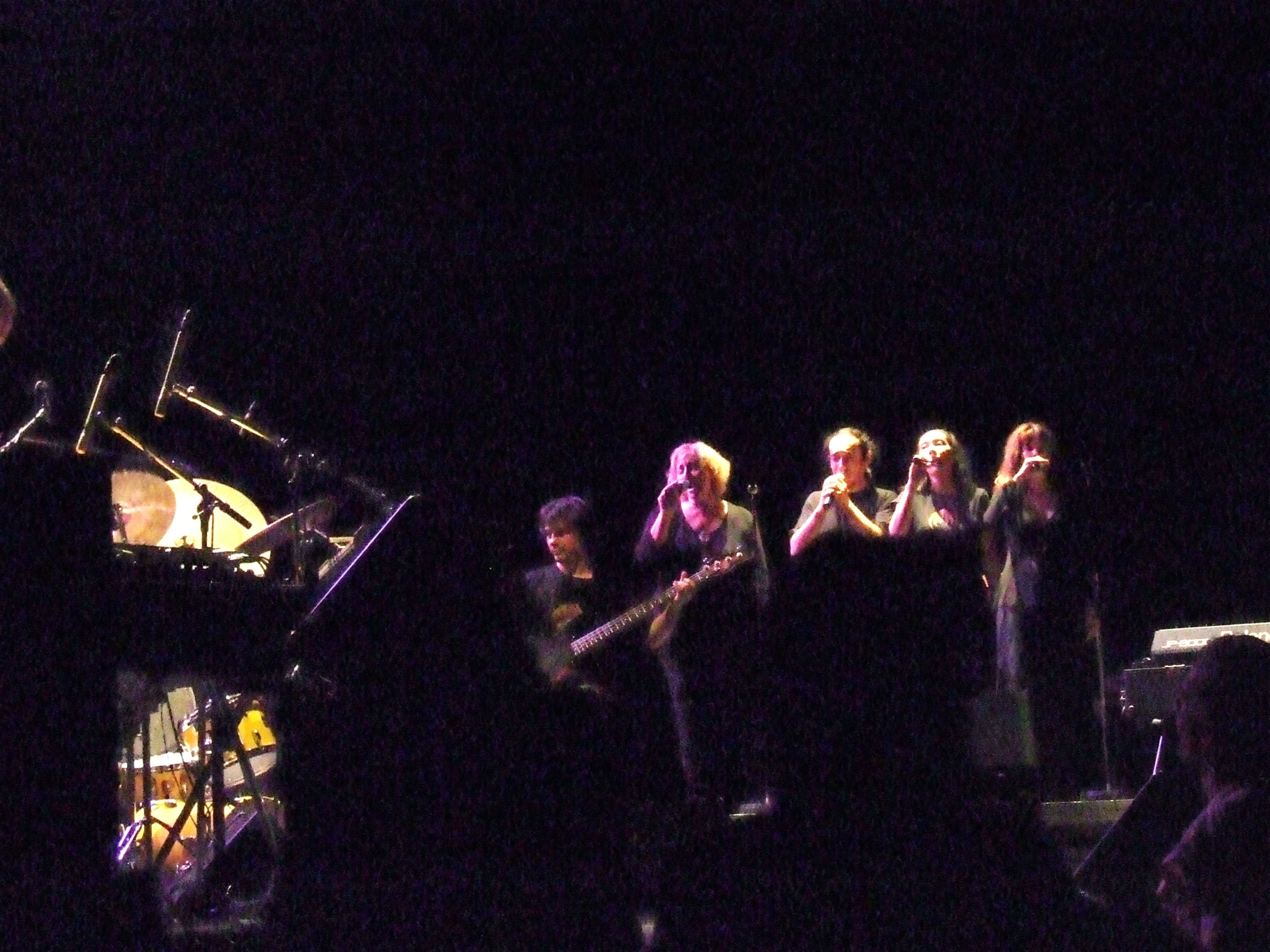 Photo du concert de Magma à la salle des Fetes de Schiltigheim